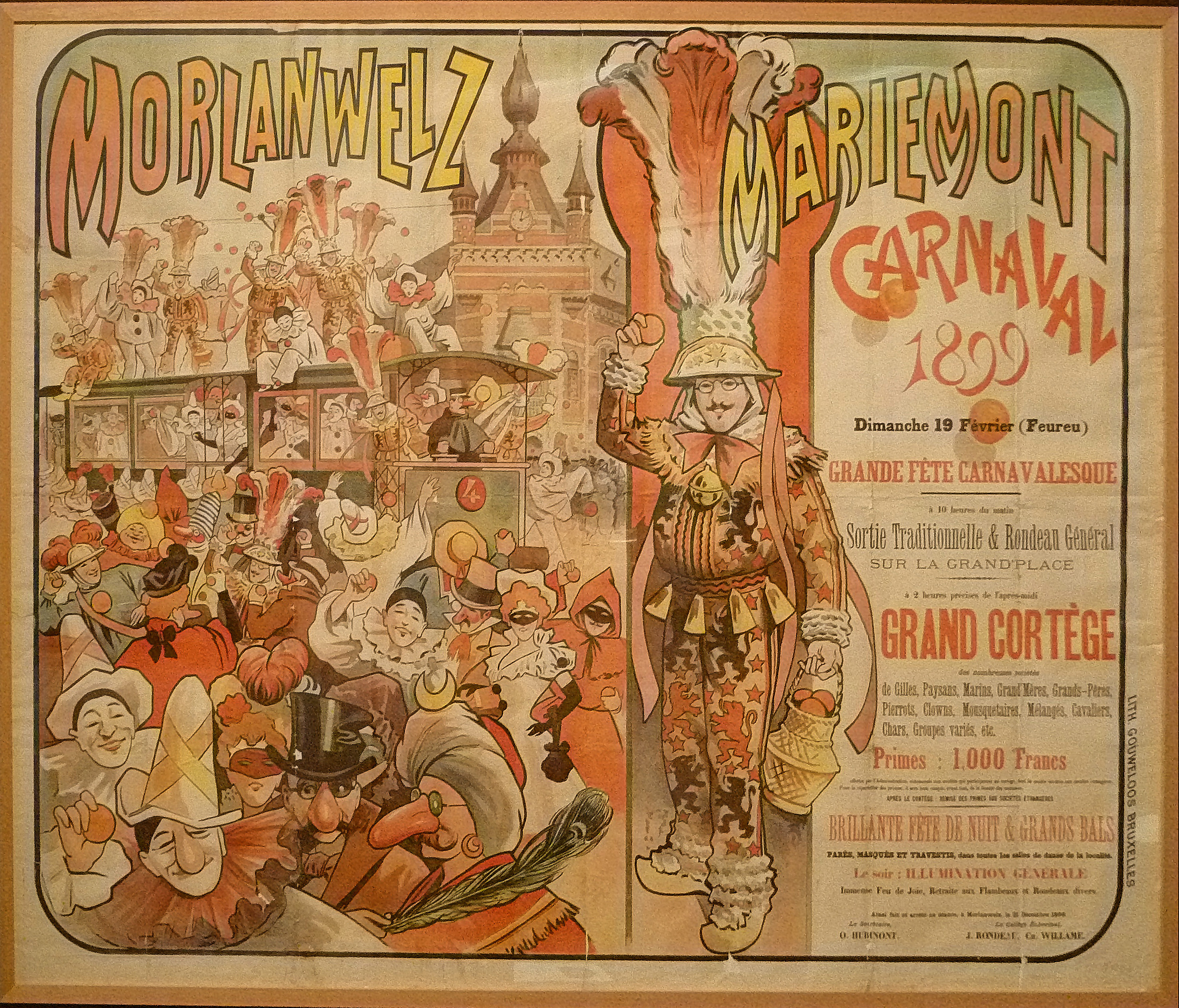 "Mariemont, carnaval 1899" (montrant Les Gilles de Binche); affiche dans le Musée Royal de Mariemont, Belgique; lithographie Gouweloos, Bruxelles